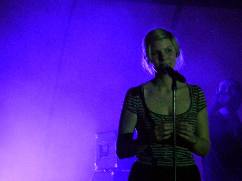 Juli am 21. Januar 2007 in der Phönix-Halle Mainz.